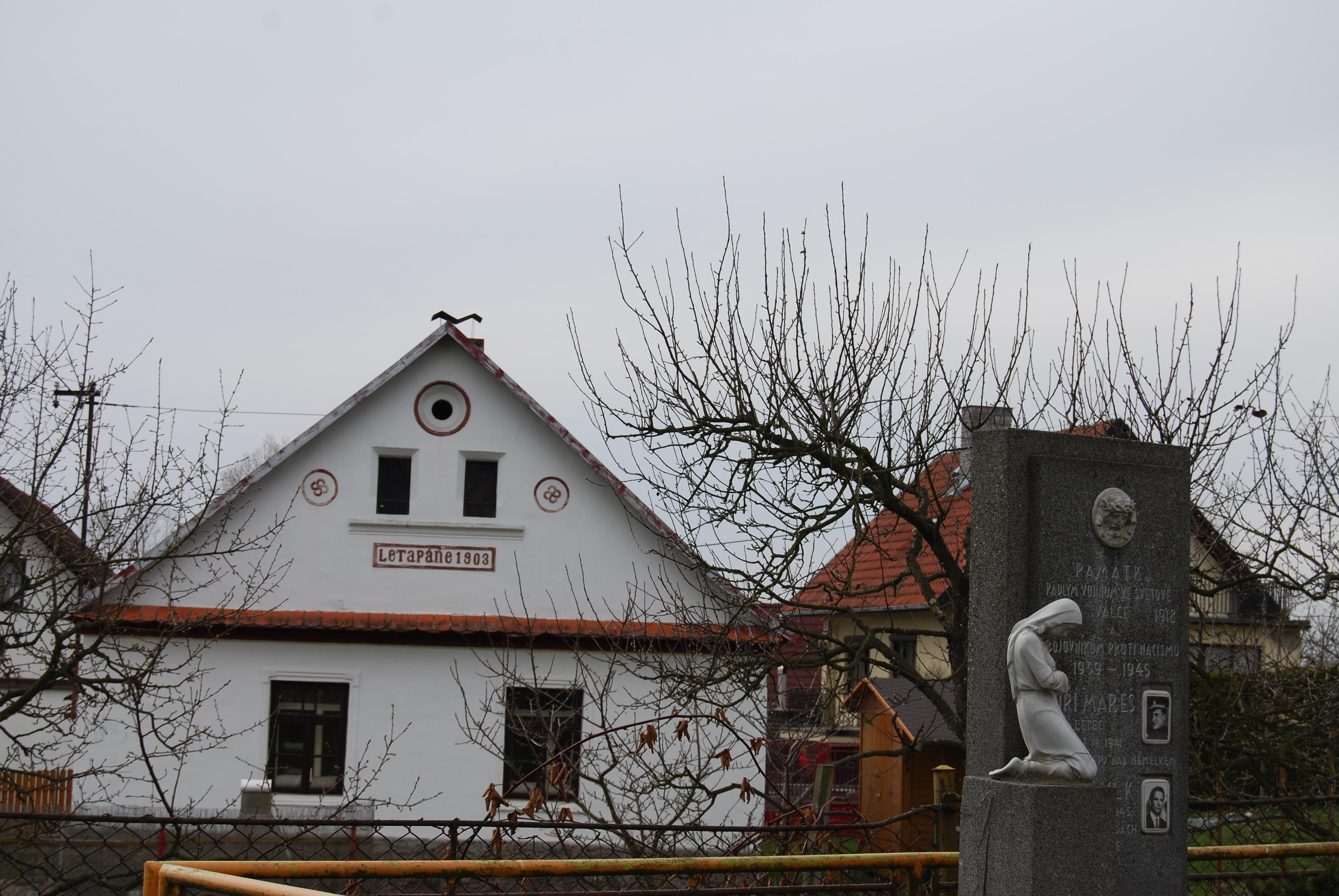 Pomník padlým v I. a II. světové válce v obci. Níkovice je vesnice, část obce Hrejkovice v okrese Písek. Česká republika.